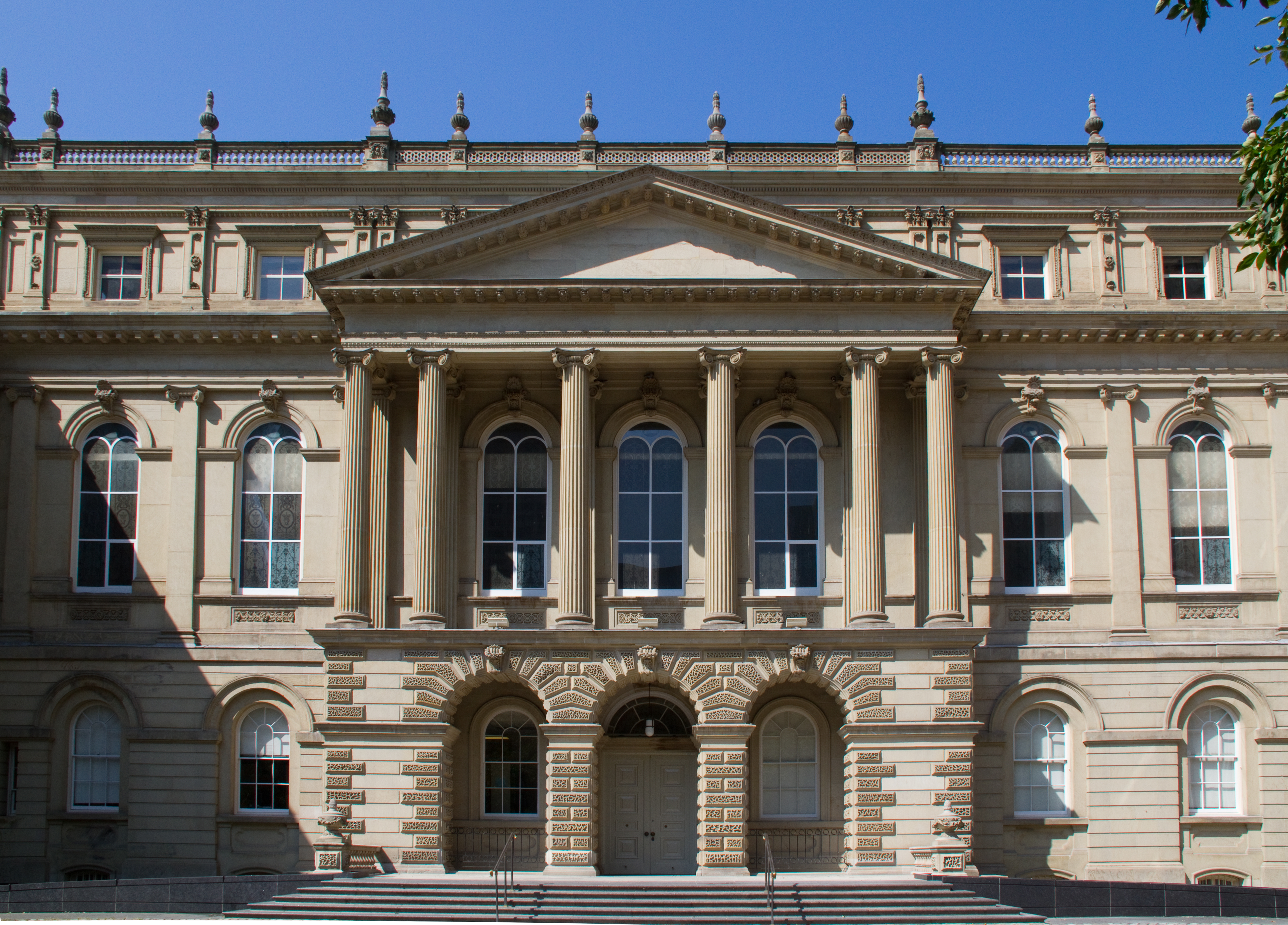 Osgoode Hall